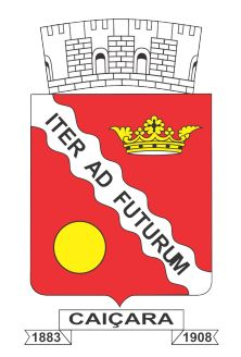 Brasão de Armas do Município de Caiçara no Estado da Paraíba, Brasil.